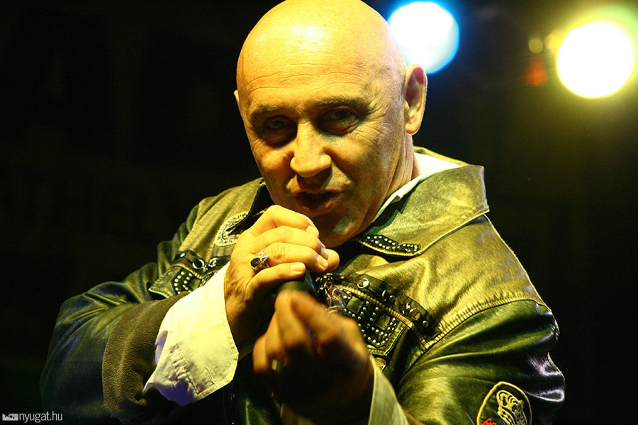 Pataky Attila (Miskolc, 1951. július 2.) magyar rockzenész, 1974-től az Edda Művek énekese.